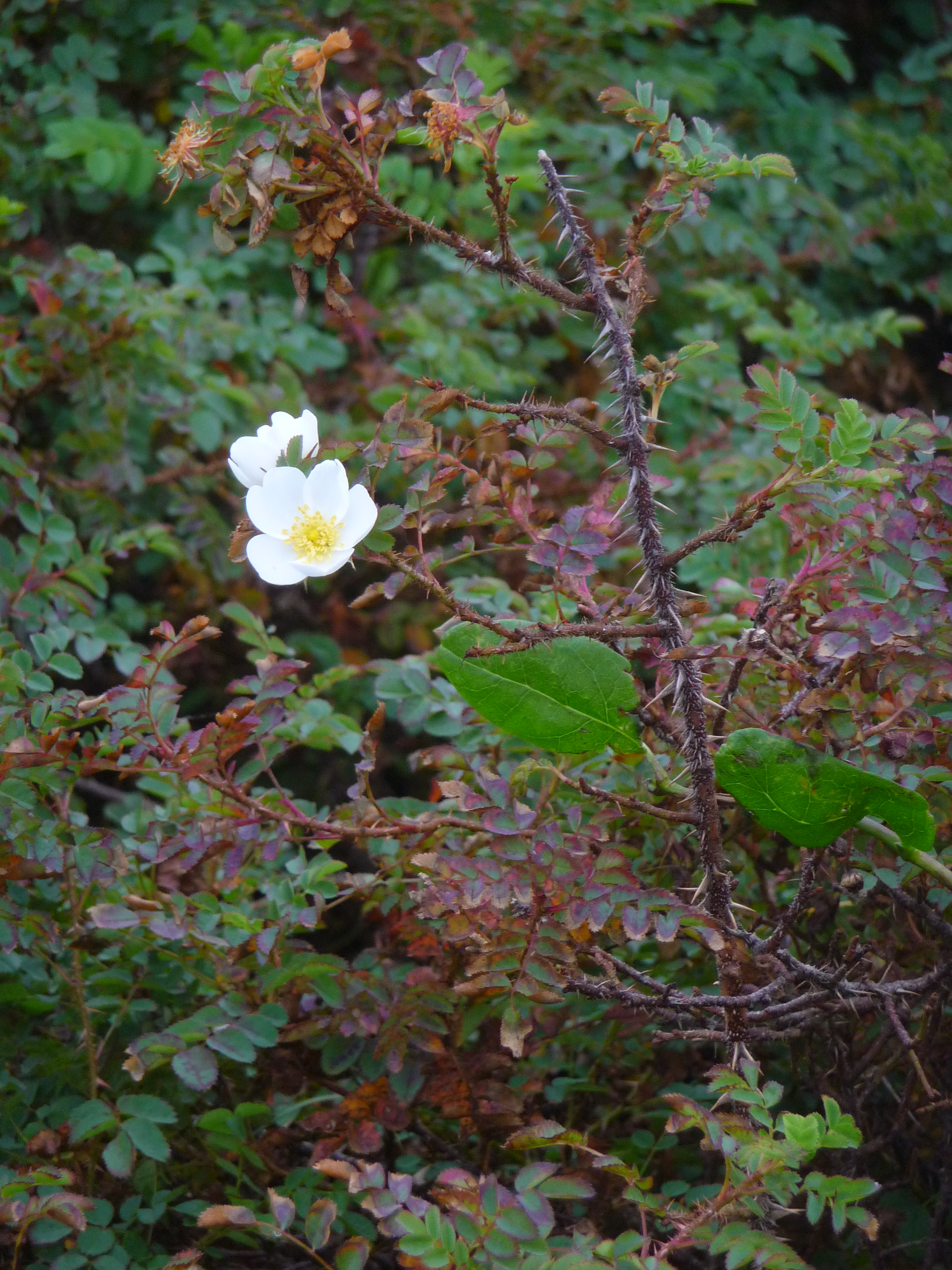 Dünenrose (Rosa spinosissima), fotografiert auf der ostfriesischen Nordseeinsel Juist (Niedersachsen, Deutschland)